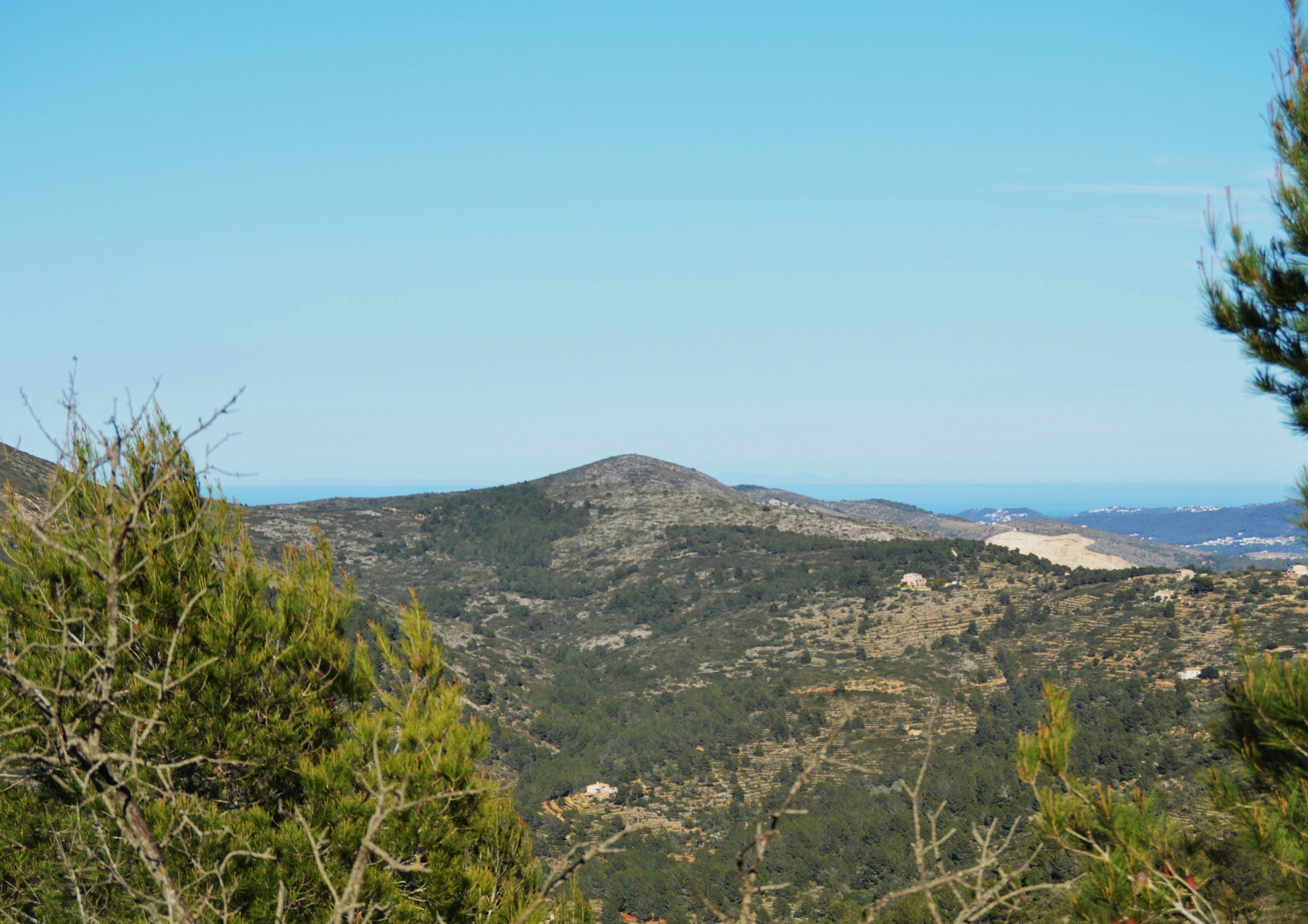 Eivissa vista des del Murtalet, Senija.